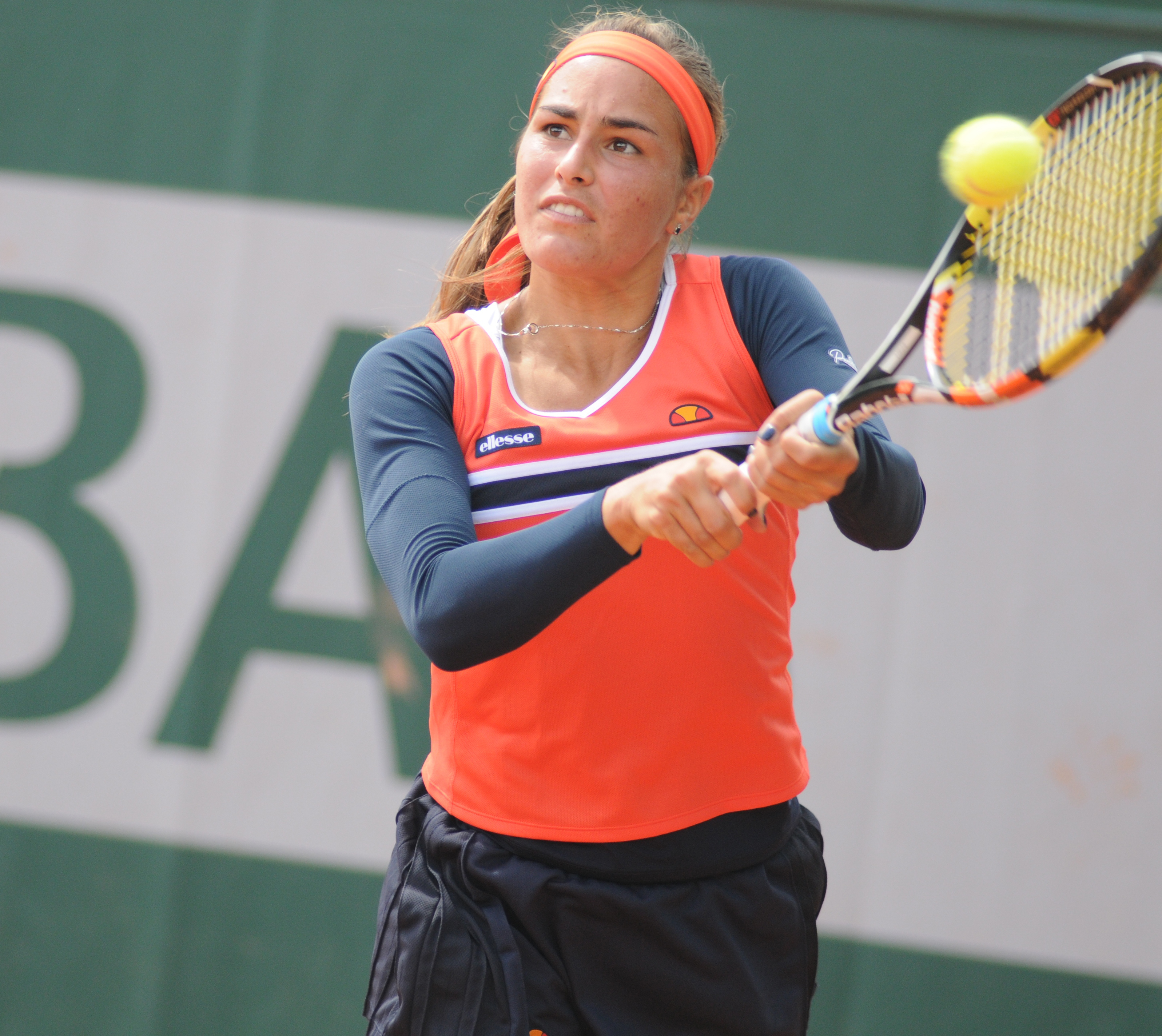 Monica Puig